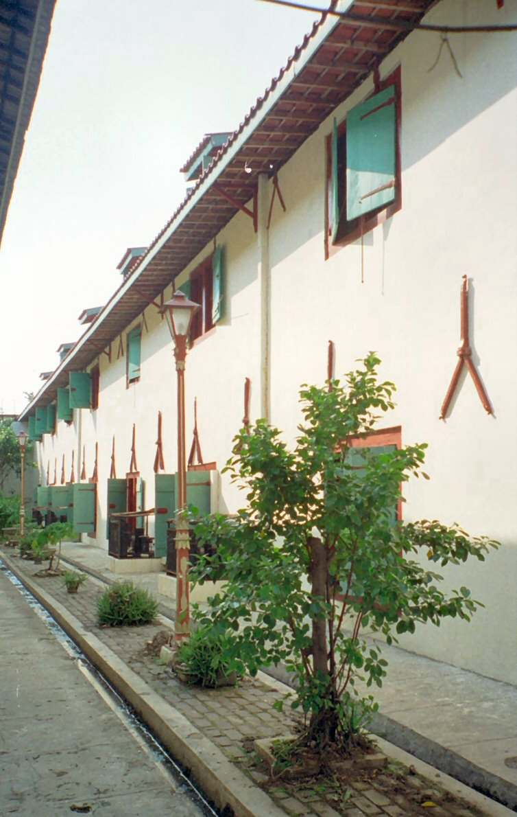 Fort - Sunda kelapa Foto zelf gemaakt 1999. Vrij te gebruiken.